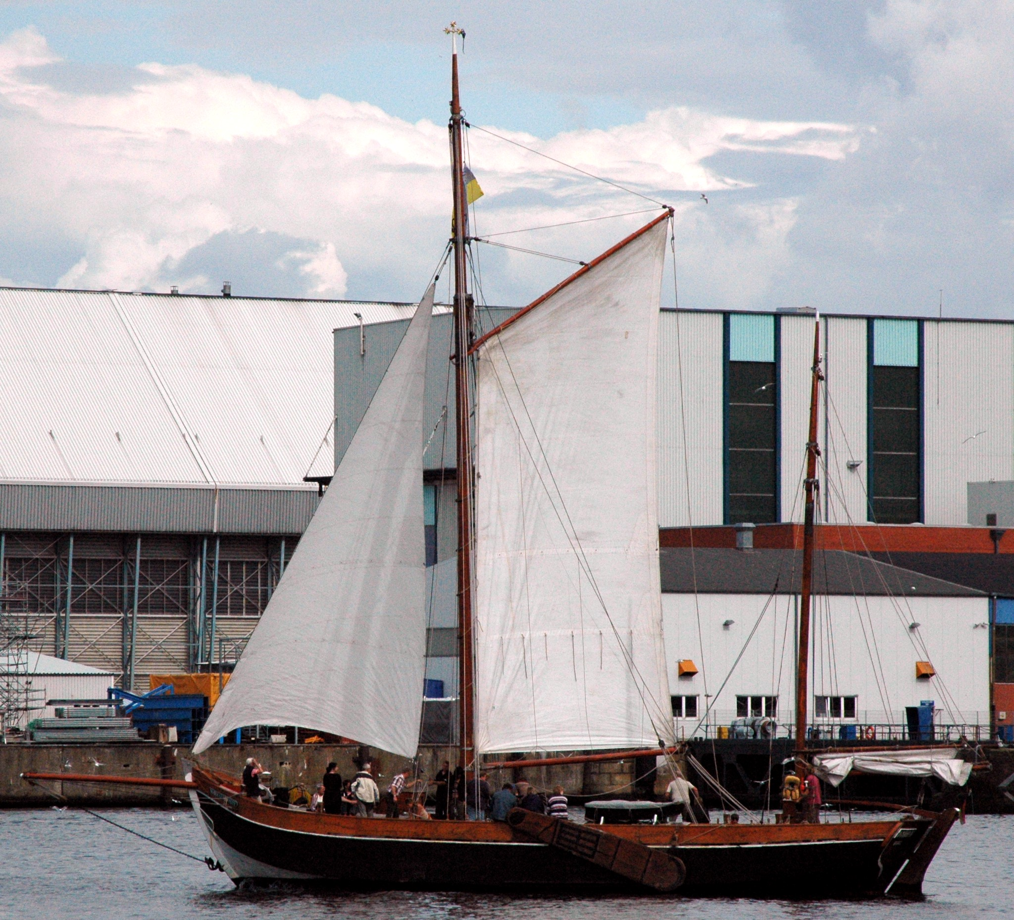 Segelschiff Fischewer "Maria af von Hoff" im Kieler Hafen